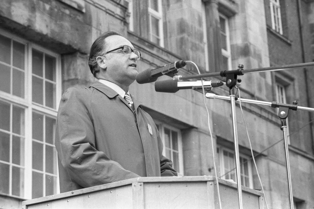 Hauptredner ist Heinz Vietheer, Vorsitzender der Gewerkschaft Handel, Banken und Versicherungen.